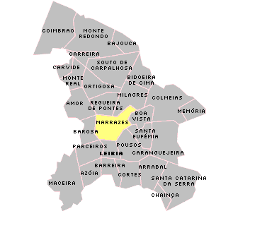 Localisation de Marrazes.PNG sur la freguesia de Leiria.